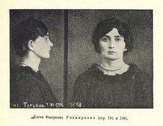 Photographie d'identité judiciaire d'Ielena Rozmirovitch, date non connue, antérieure à 1917